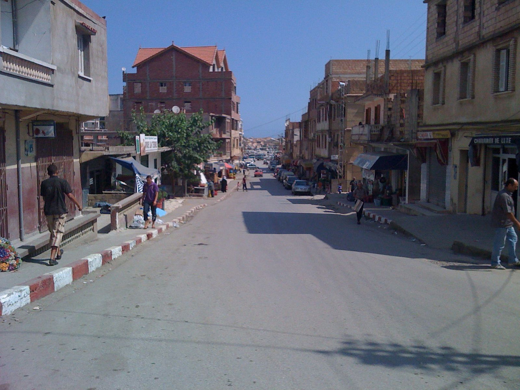 La rue principale de la Cité Bensaïd (appelée aussi Vaccaro), à Tichy dans la wilaya de Béjaïa